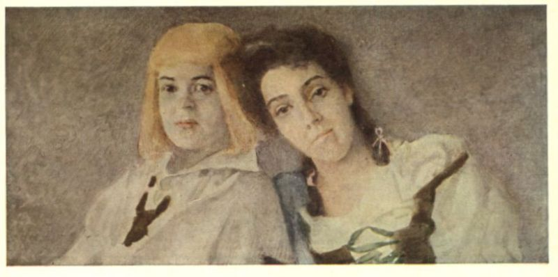 Портрет артисток Т.С. Любатович в роли Гензеля и Н.Н. Забелы в роли Гретель